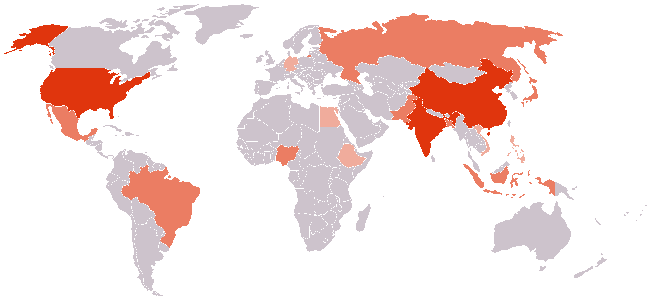 Die 16 bevölkerungsreichsten Staaten der Welt Die Weltkarte zeigt die 16 bevölkerungsreichsten Staaten. Die Angaben sind dem DSW-Datenreport 2011 der Deutschen Stiftung Weltbevölkerung vom September 2011 entnommen und entsprechen der Publikation des Population Reference Bureau: 2011 World Population Data Sheet. Rot: Volksrepublik China: 1354 Millionen (etwa 19,3 % der Weltbevölkerung) Indien: 1241 Mio. (17,7 %) USA: 312 Mio. (4,5 %) Mittel-Rot: Indonesien: 238 Mio. (3,4 %) Brasilien: 197 Mio. (2,8 %) Pakistan: 177 Mio. (2,5 %) Nigeria: 162 Mio. (2,3 %) Bangladesch: 151 Mio. (2,2 %) Russland: 143 Mio. (2,0 %) Japan: 128 Mio. (1,8 %) Mexiko: 115 Mio. (1,6 %) Hellrot: Philippinen: 96 Mio. (1,4 %) Vietnam: 88 Mio. (1,3 %) Äthiopien: 87 Mio. (1,2 %) Ägypten: 83 Mio. (1,2 %) Deutschland: 82 Mio. (1,2 %)